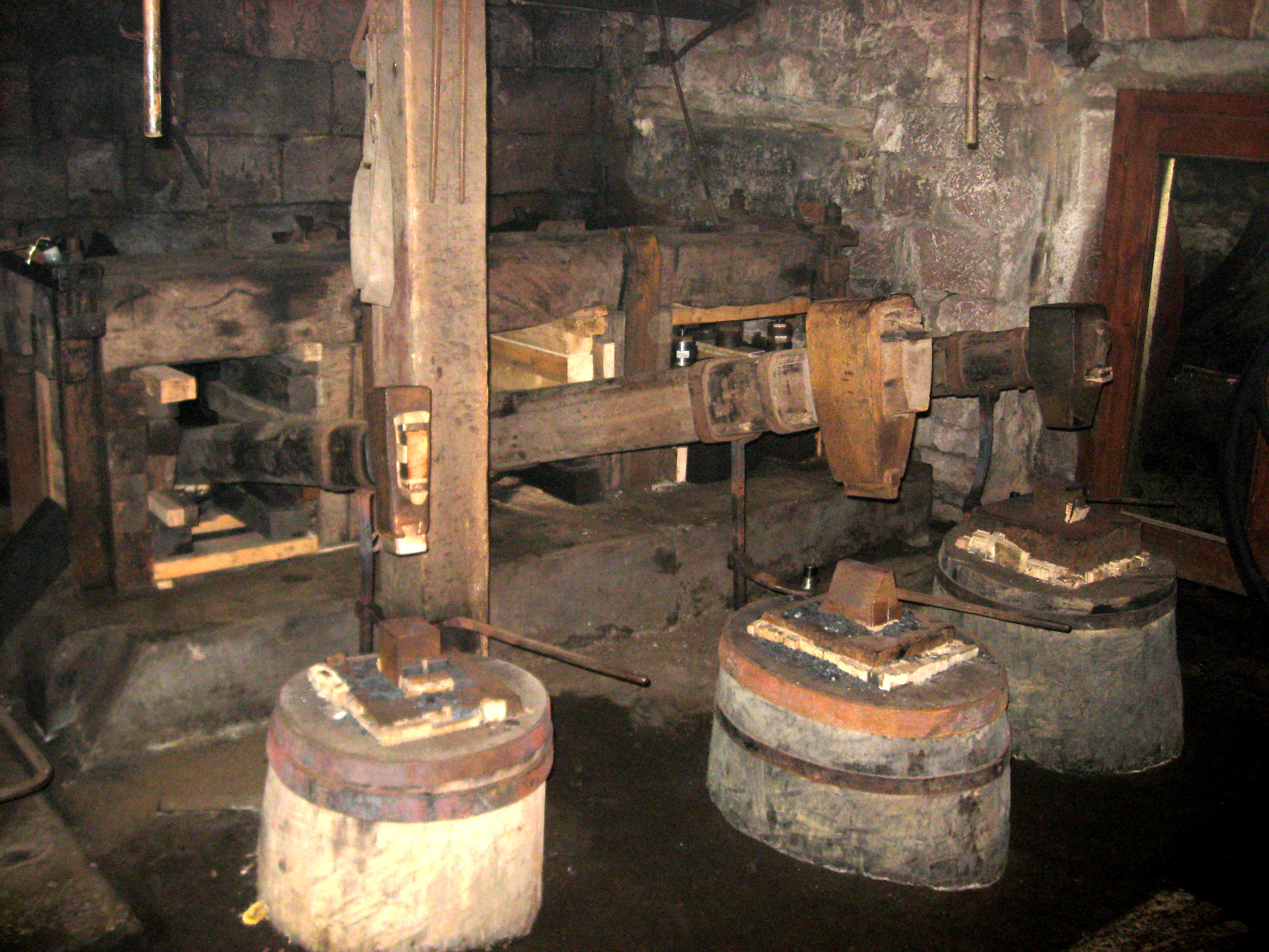 Die drei Schwanzhämmer in der Wappenschmiede von Elmstein werden durch Wasserkraft angetrieben